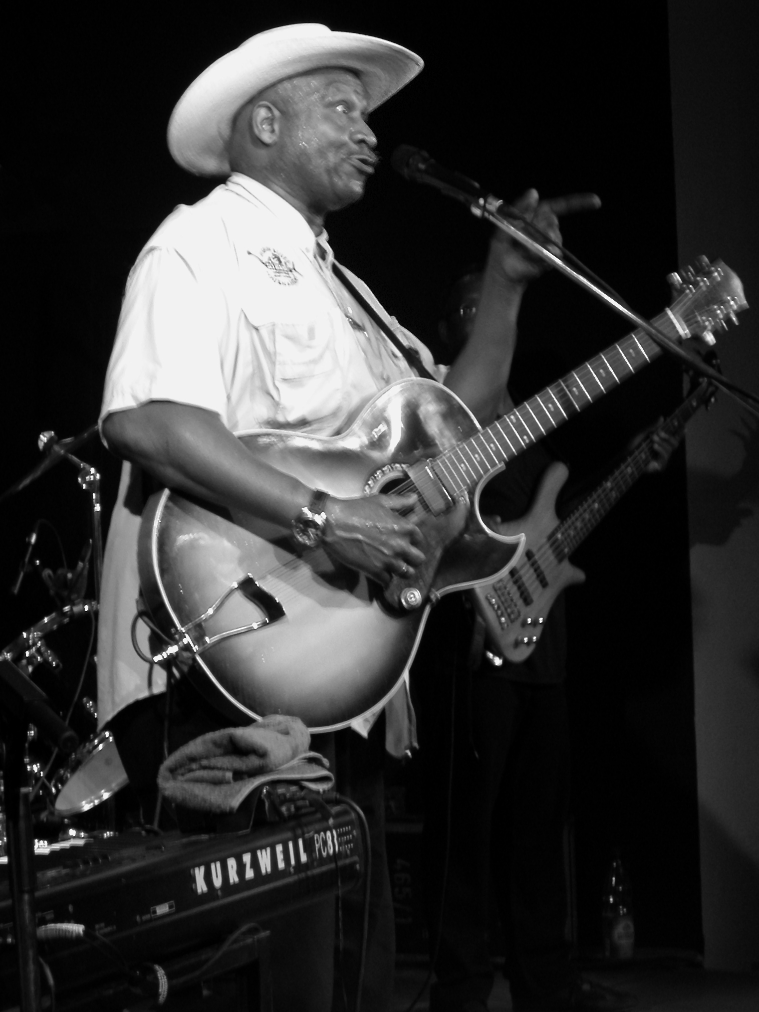 Der Bluesmusiker Taj Mahal im Kult in NIederstetten